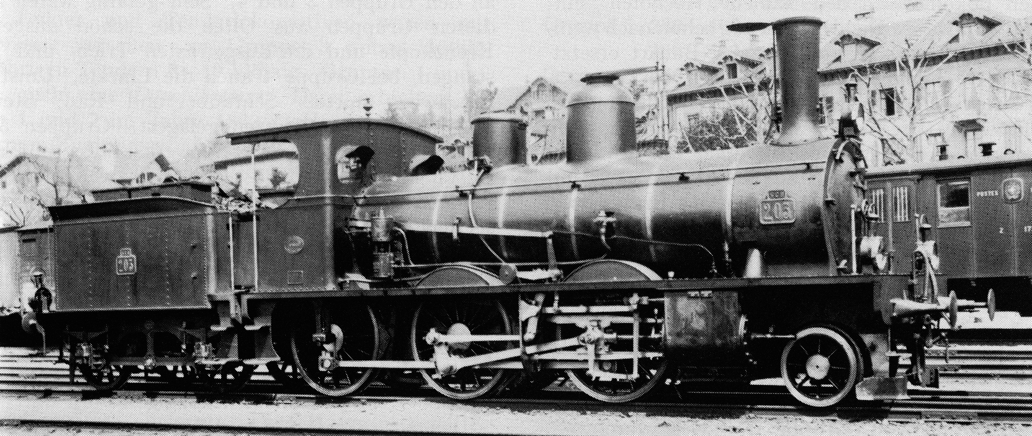 Schnellzuglocomotive A3T Nr. 203 der Schweizeriſchen Centralbahn, gebaut 1892 zů Belfort von der Société Alſacienne de Conſtructions Mécaniques (Fabricationsnr. 4422; Tender Nr. 3762), 1902 als B 3/4 Nr. 1473 von den Schweizeriſchen Bundesbahnen übernommen, 1925 außer Dienſt geſtellt und anſchließend abgebrochen.